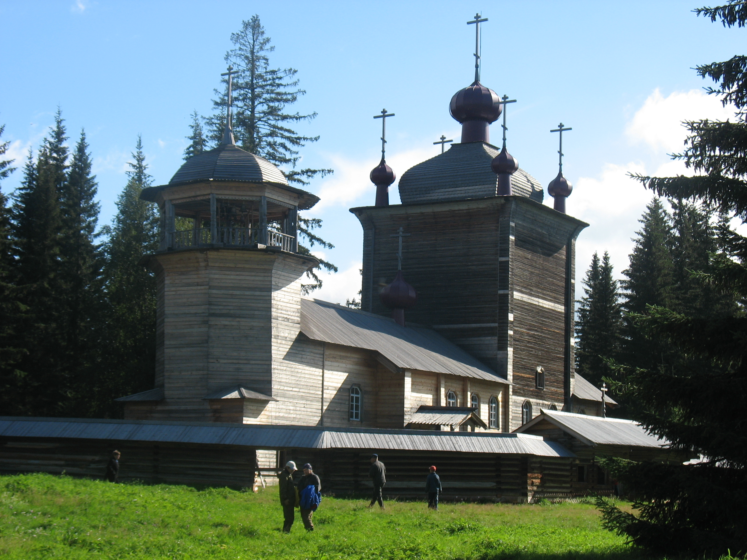 (Республика Карелия, Пудож, оз. Водлозеро, остров)